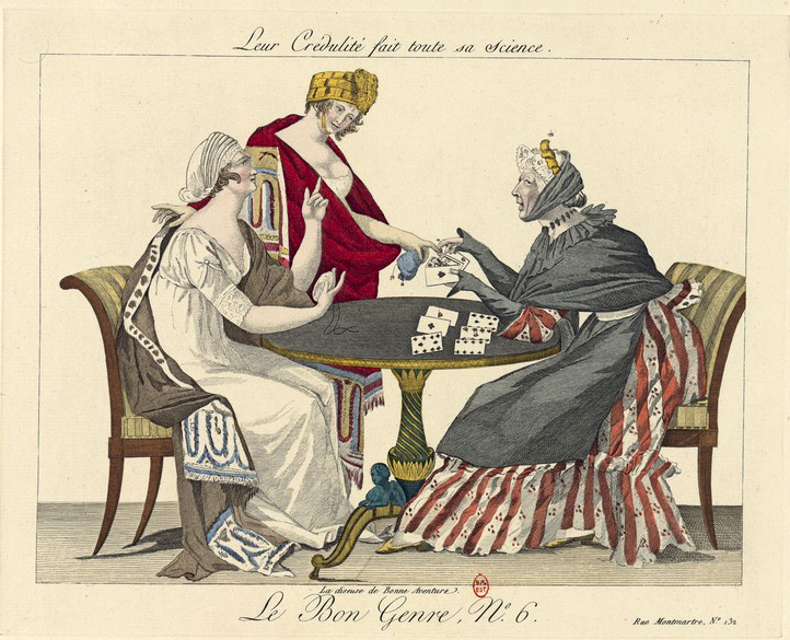 Gravure coloriée à la main de la série Le Bon Genre publiée par Pierre de la Mésangère.